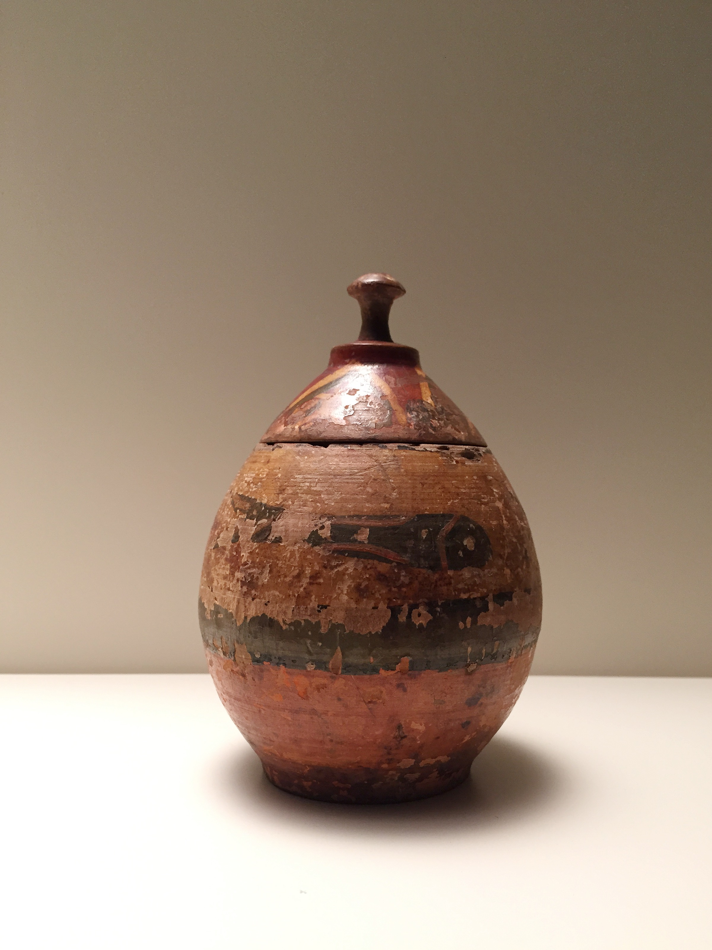 Lipsanoteca de Taüll, segles XI-XII, conservada al MNAC. Fusta policromada al tremp.